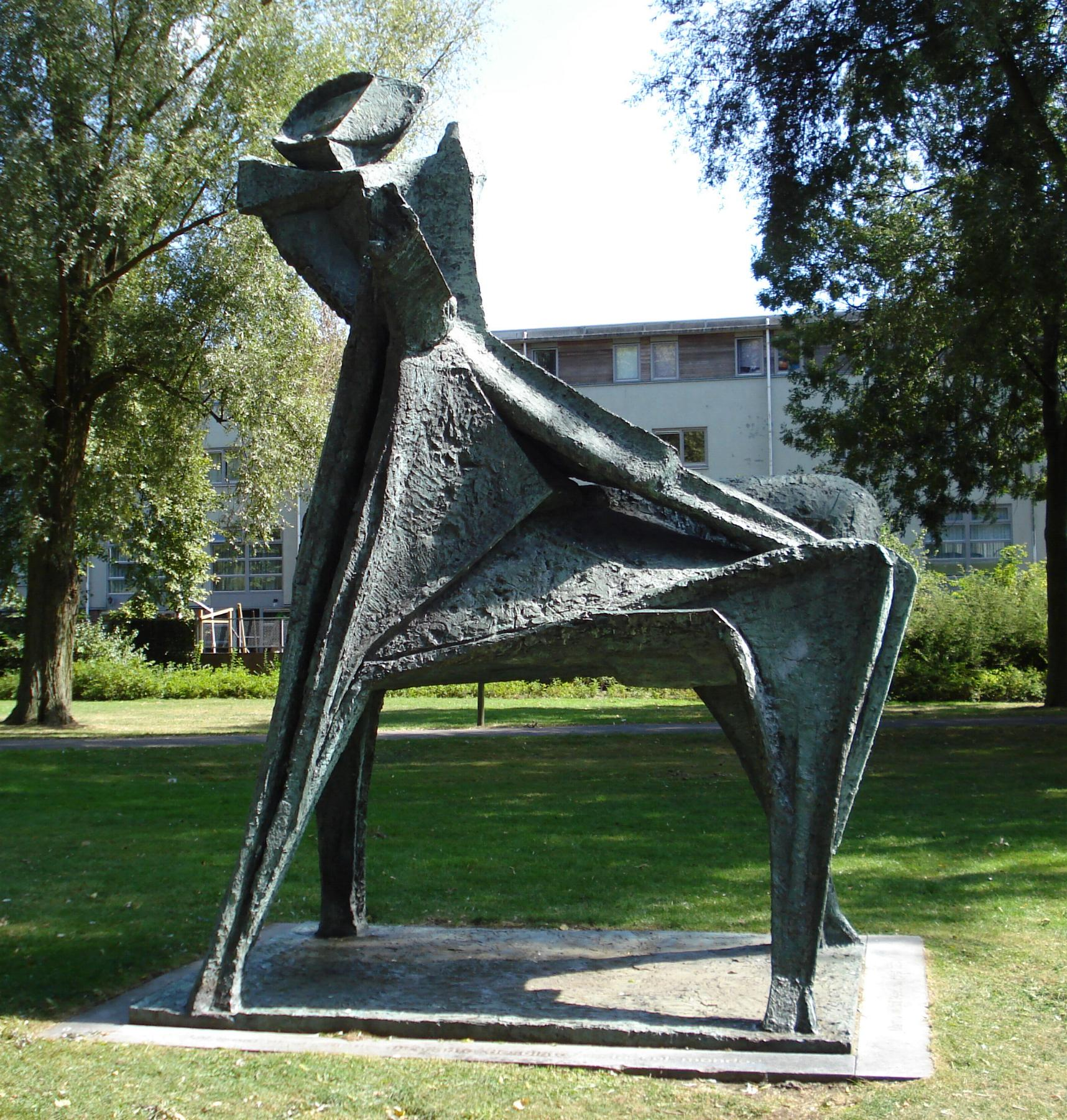 Den Haag, Winkelstede. Kunstwerk "Paard en ruiter" van Marino Marini. The Hague/The Netherlands.